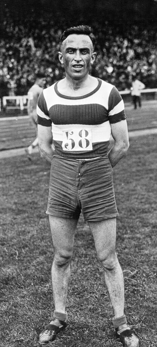 Colombes, championnat de Paris d'athlétisme : Norland (portrait) : [photographie de presse] / Agence Meurisse